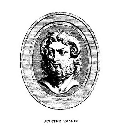 Jupiter_Ammon-aux_cornes_de_bélier